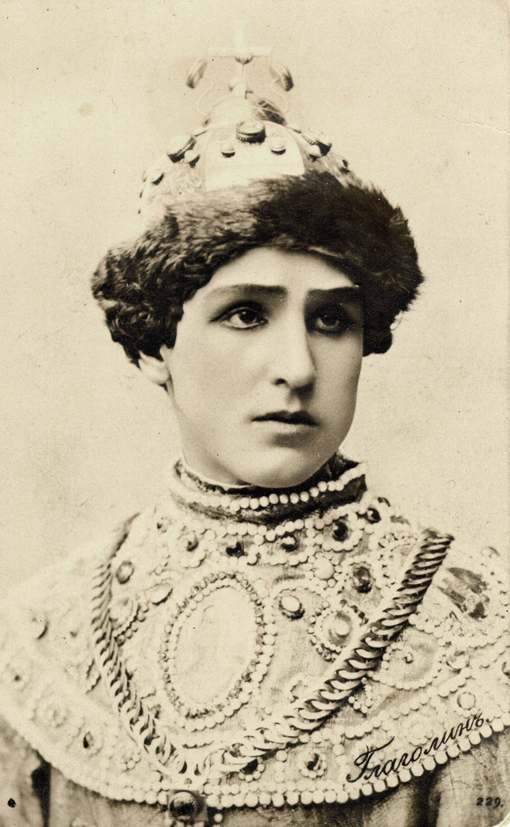 Открытка "Б. Глаголин в роли царя Фёдора в спектакле "Царь Фёдор Иоаннович"